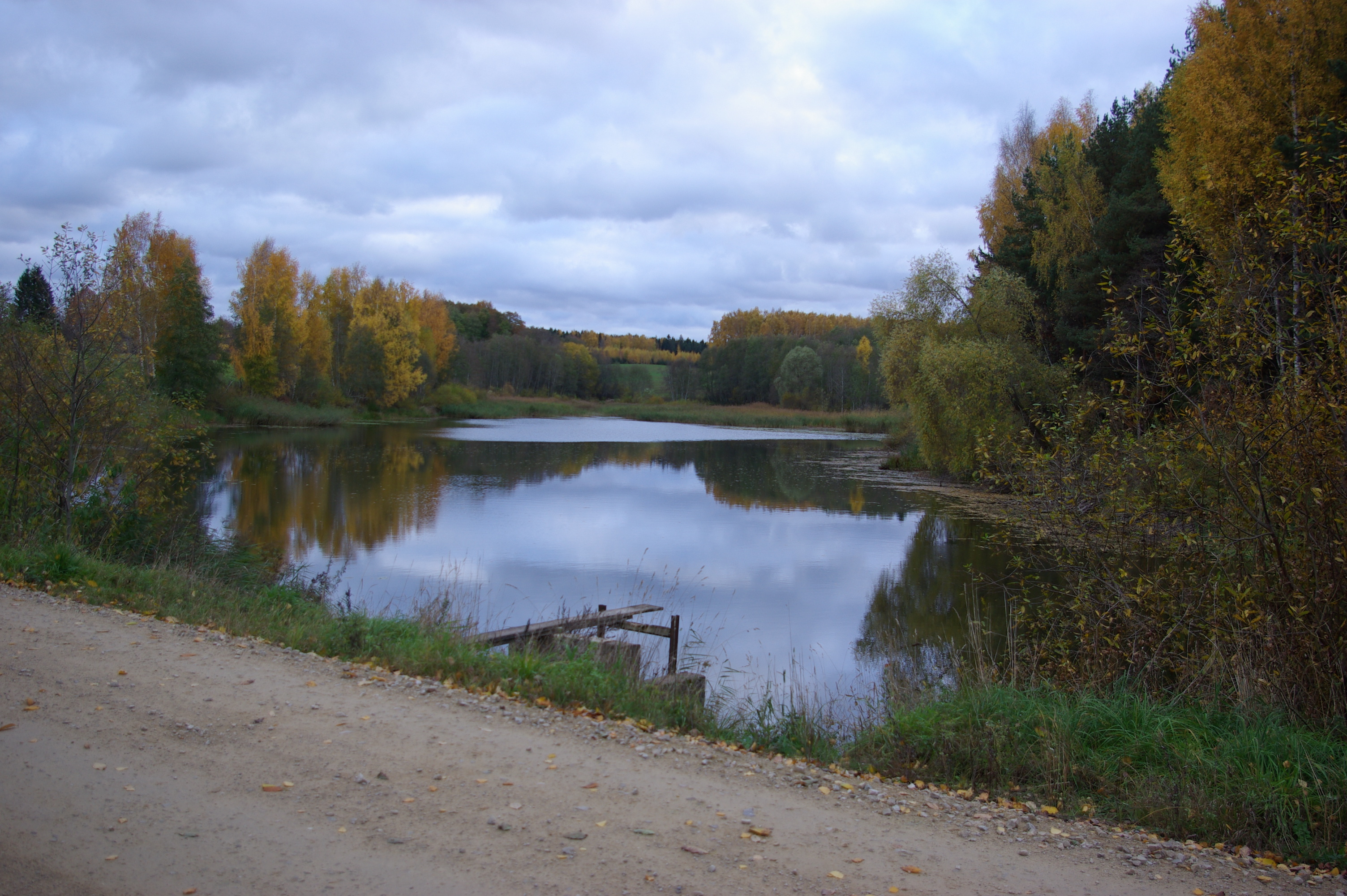 Hilläkeste järv